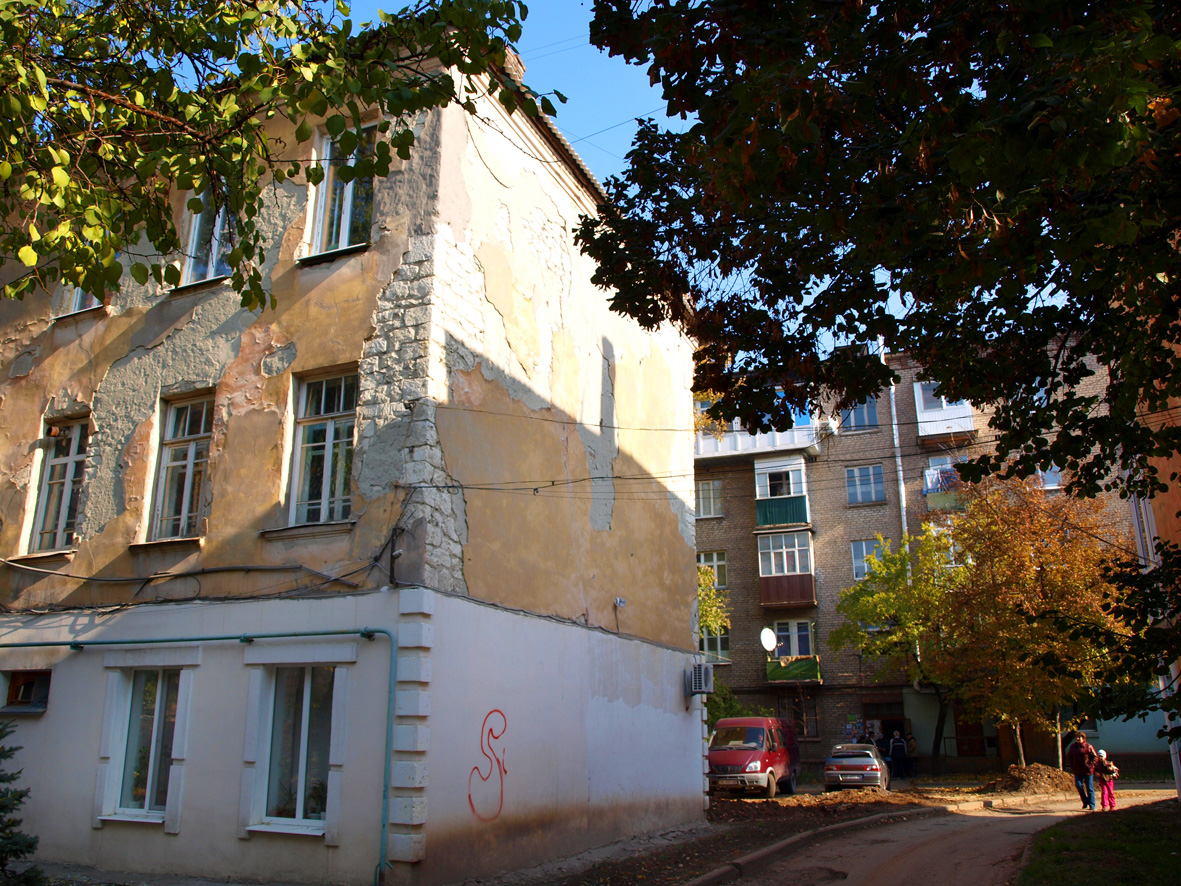 Здание на улице Демехина.